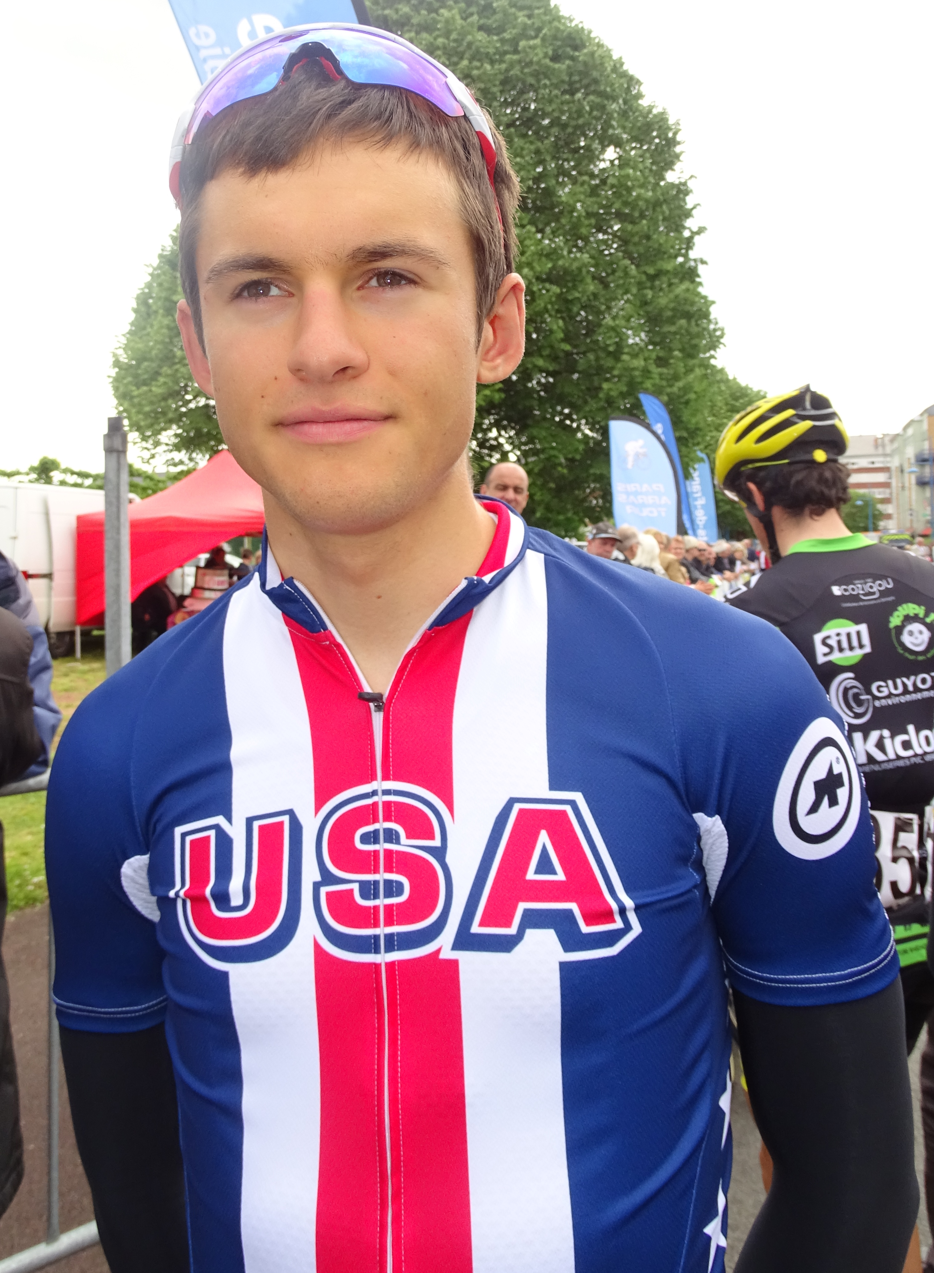 Reportage réalisé le vendredi 20 mai 2016 à l'occasion du départ de la première étape du Paris-Arras Tour 2016 à Douchy-les-Mines, Nord, Nord-Pas-de-Calais-Picardie, France. Depicted person: Chad Young